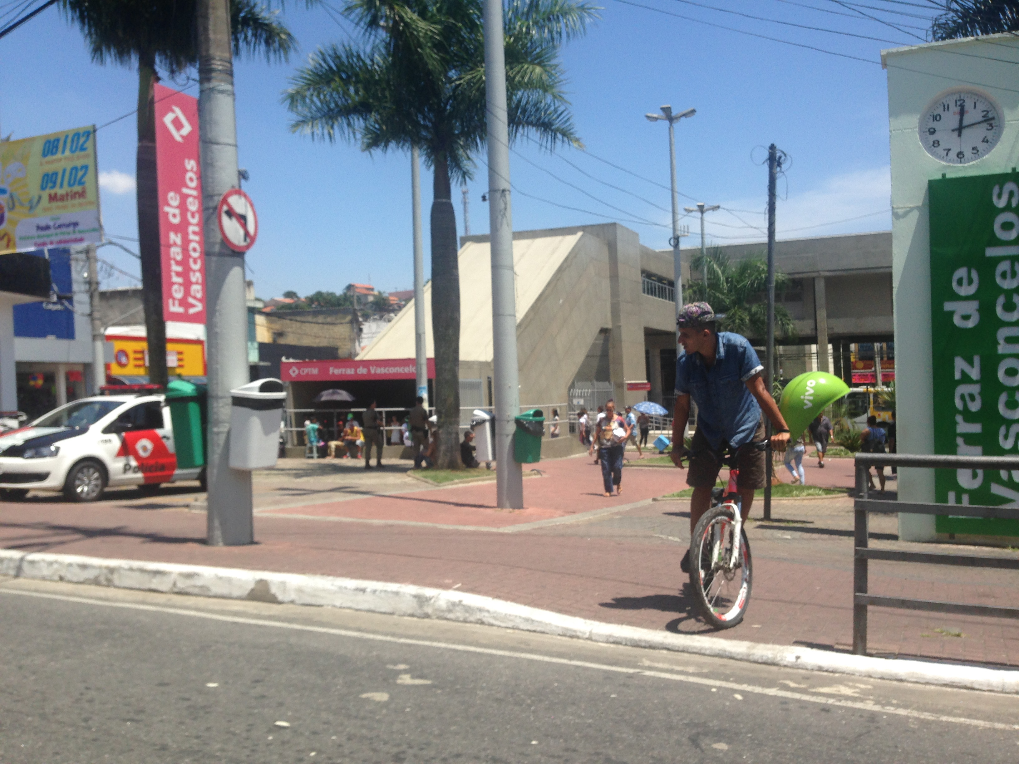 Praça da Bíblia, localiza-se na região central de Ferraz de Vasconcelos/SP na avenida Brasil s/n. Fachada da estação Ferraz. Autorizo cópias desde que se contenham créditos da autoria de José Spadoni Barros, respeite o autor.